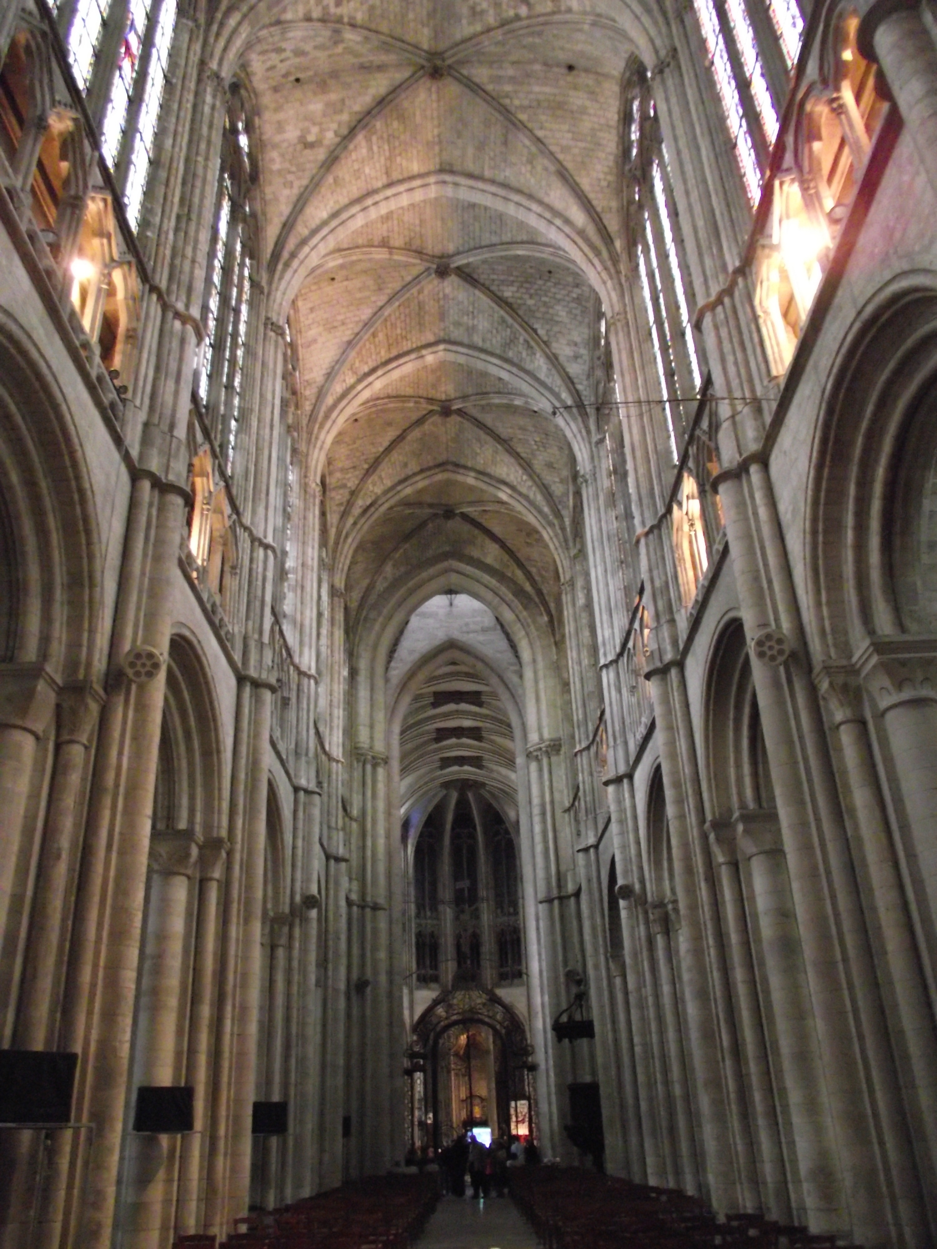 Cathédrale Notre-Dame d'Évreux, XIII-XV siècle